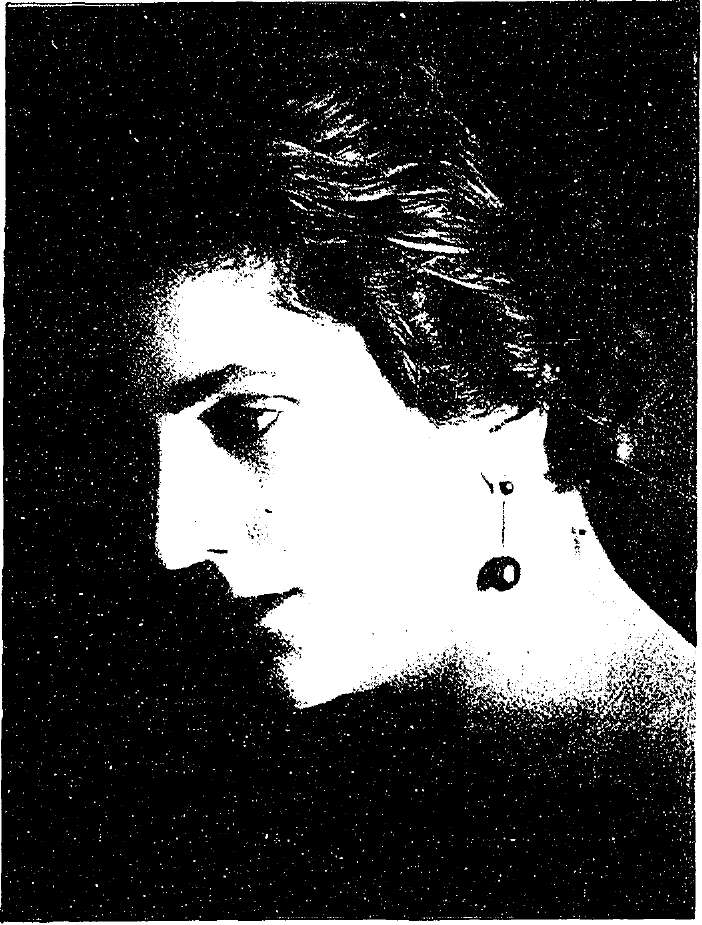 תמר רובינס